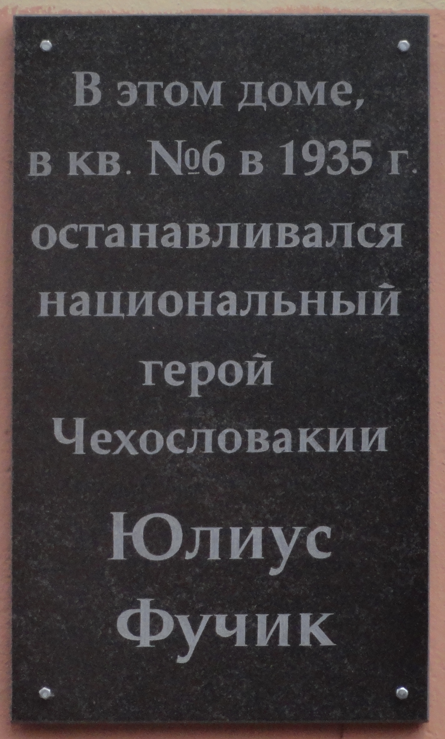 В 1930 х гг., Юлиус фучик посещал СССР, в некоторых местах где он останавливался установлены мемориальные доски. Памятная доска установлена в Нижнем Новгороде в 1985 году, на стене дома проспект Молодежный, 22.